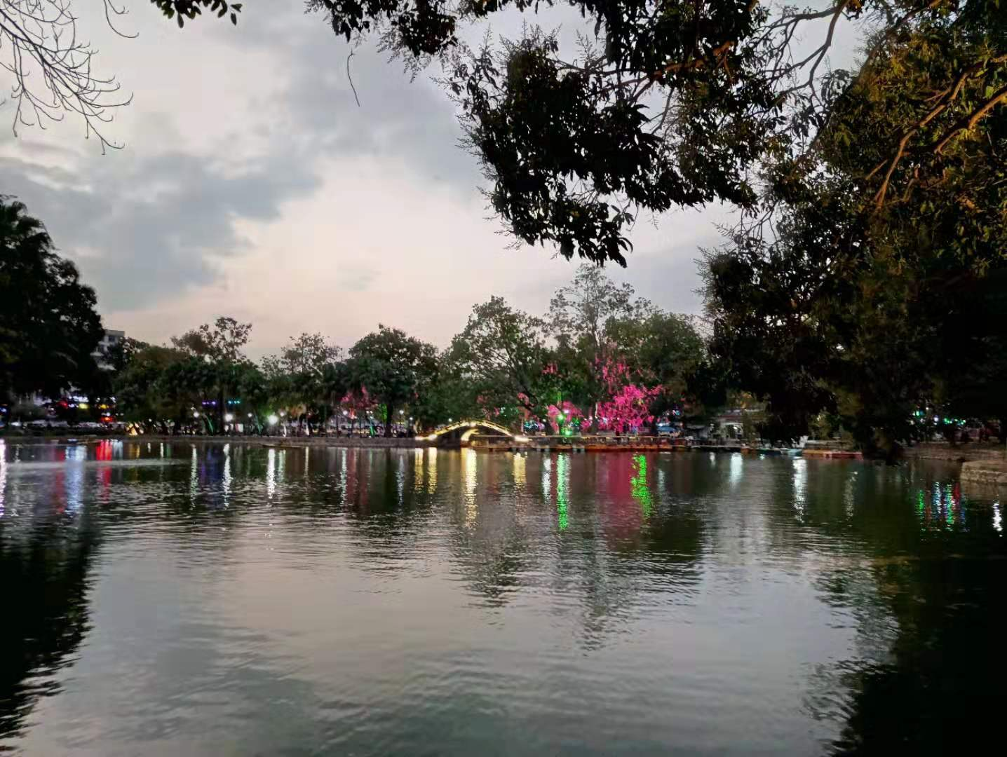 中文（中国大陆）: 潘州公园一景